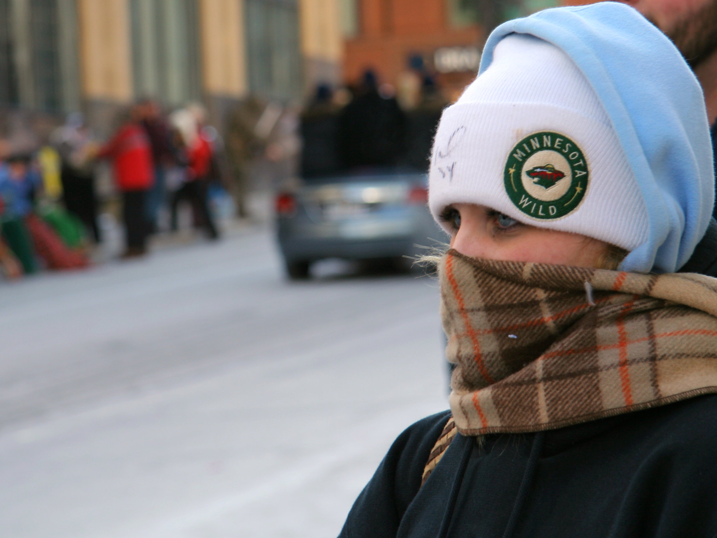 Saint Paul, Minnesota